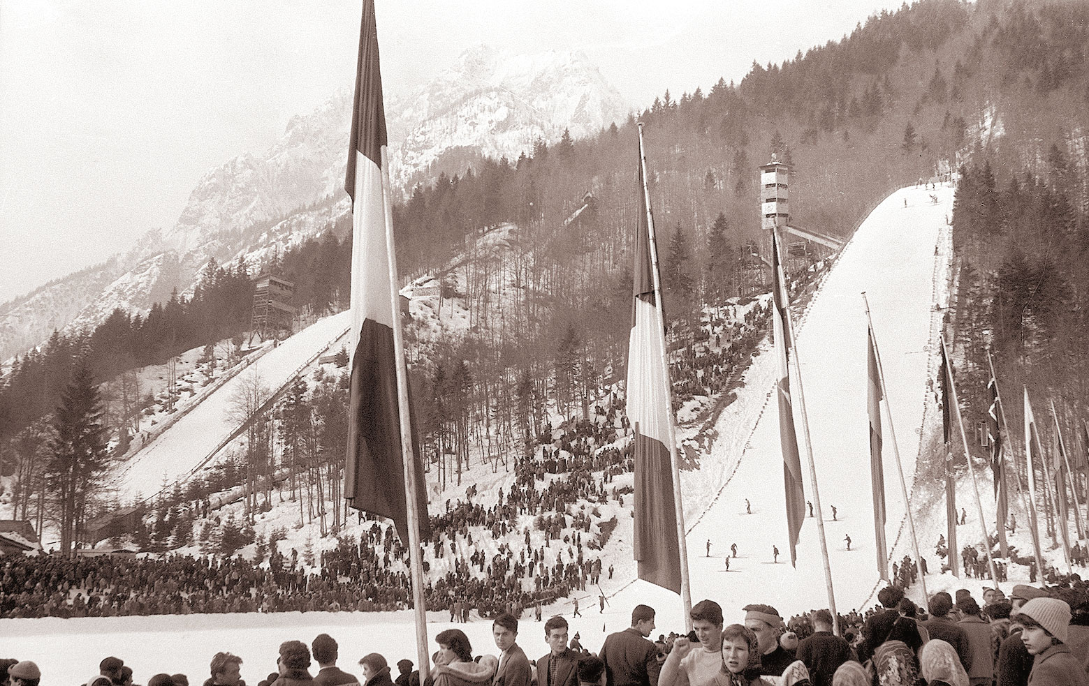 Tekma ob 25-letnici planiške mamutske skakalnice, sobota